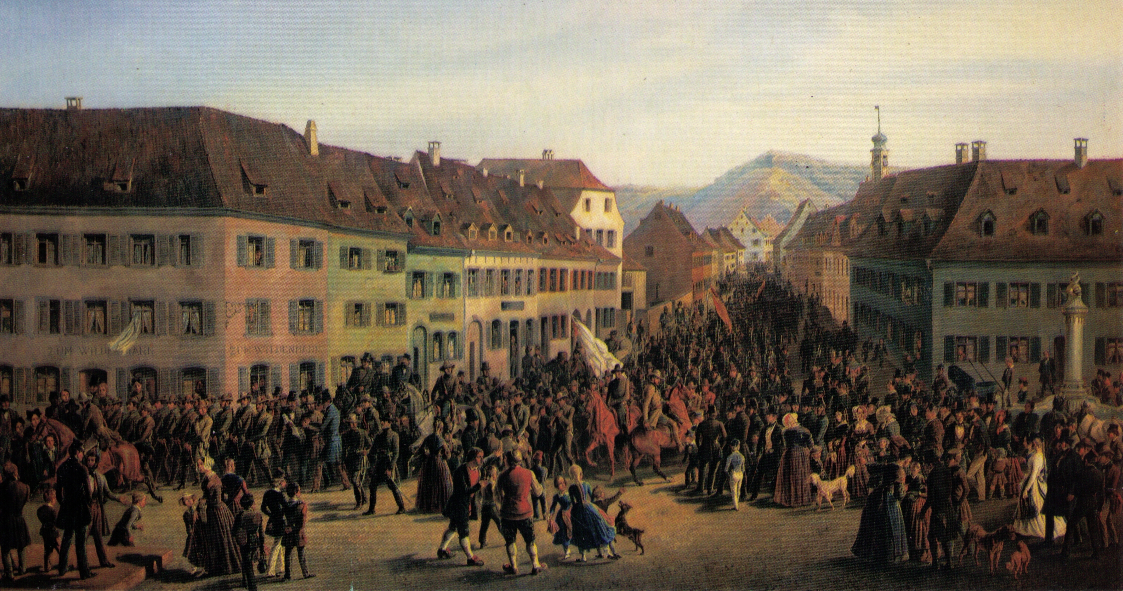 Einzug der Freischärler unter der Führung von Gustav Struve in Lörrach am 20. April 1848. Die Truppe war auf dem Weg zur Unterstützung des Hecker-Aufstands bei der Schlacht von Kandern am selben Tag. (Belegstelle in Gustav Struve: Geschichte der drei Volkserhebungen in Baden 1848/ 1849, Freiburg, 1980, S. 67f., Zitat: "Um so schnell als möglich die Verbindung mit der Heckerschen Schar herzustellen, zog die Weißhaar-Struve`sche Colonne, etwa 700 Mann stark, am folgenden Morgen, Gründonnerstag, den 20. April, nach Lörrach. Daselbst sollte Rast gehalten werden." Entry of the volunteer militia into Lörrach under Struve's leadership on 20 April 1848 to support the Friedrich Hecker Uprising at the Battle of Kandern. Oil painting by Friedrich Kaiser.